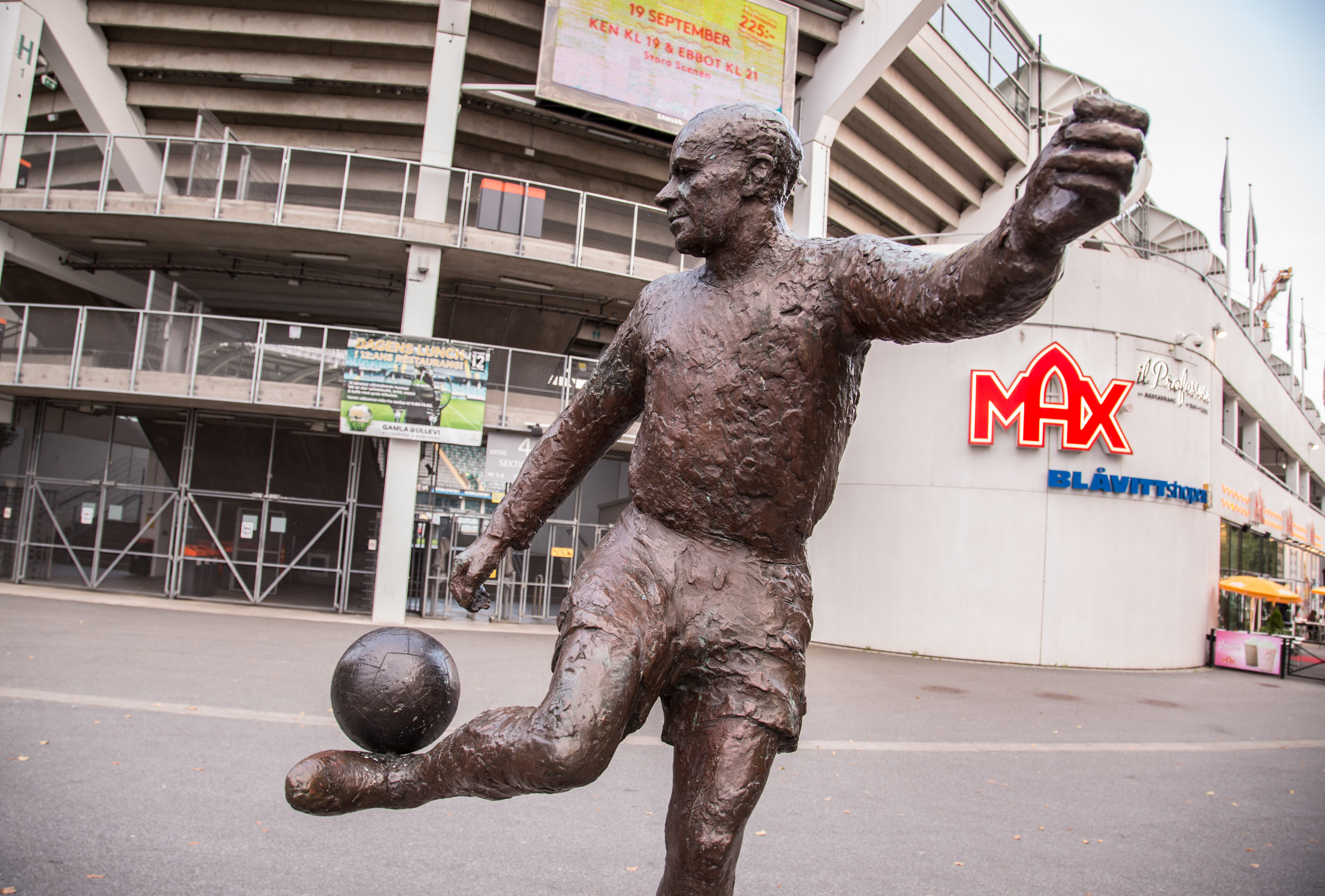 Gothenburg, Sweden